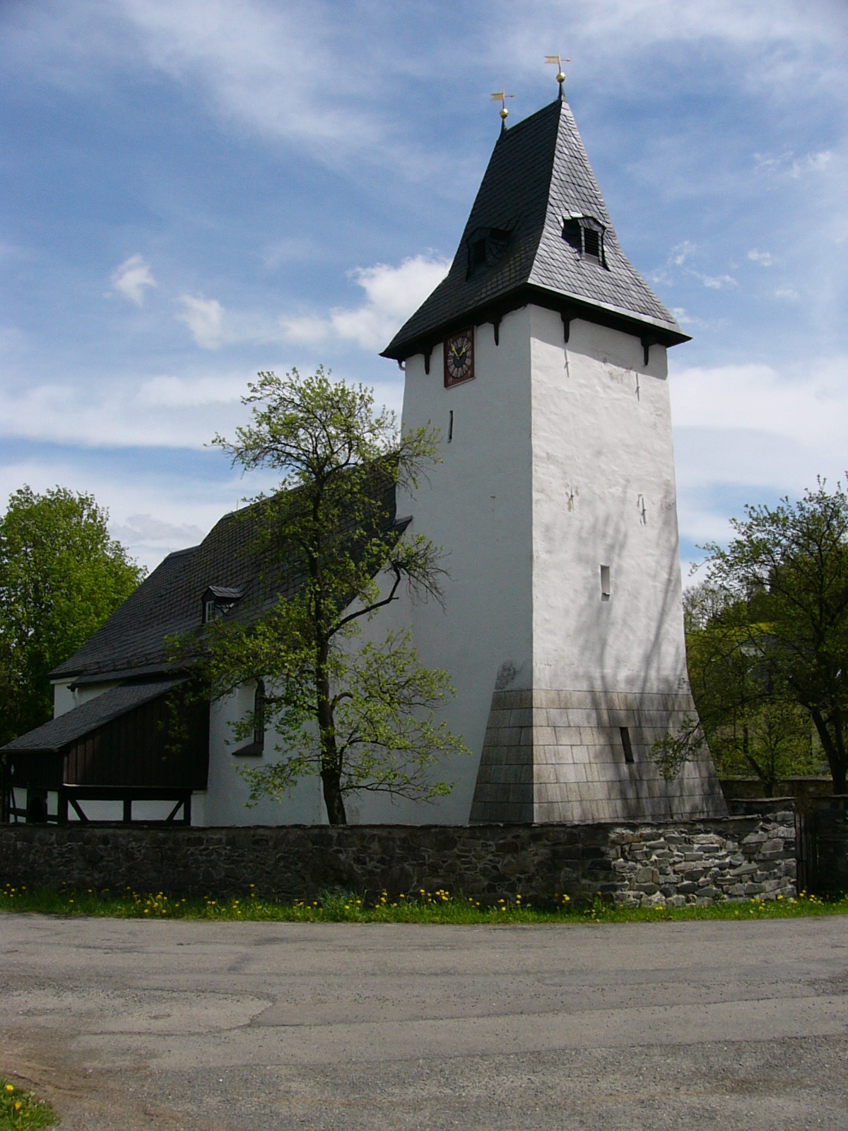 Kirche in Thossen